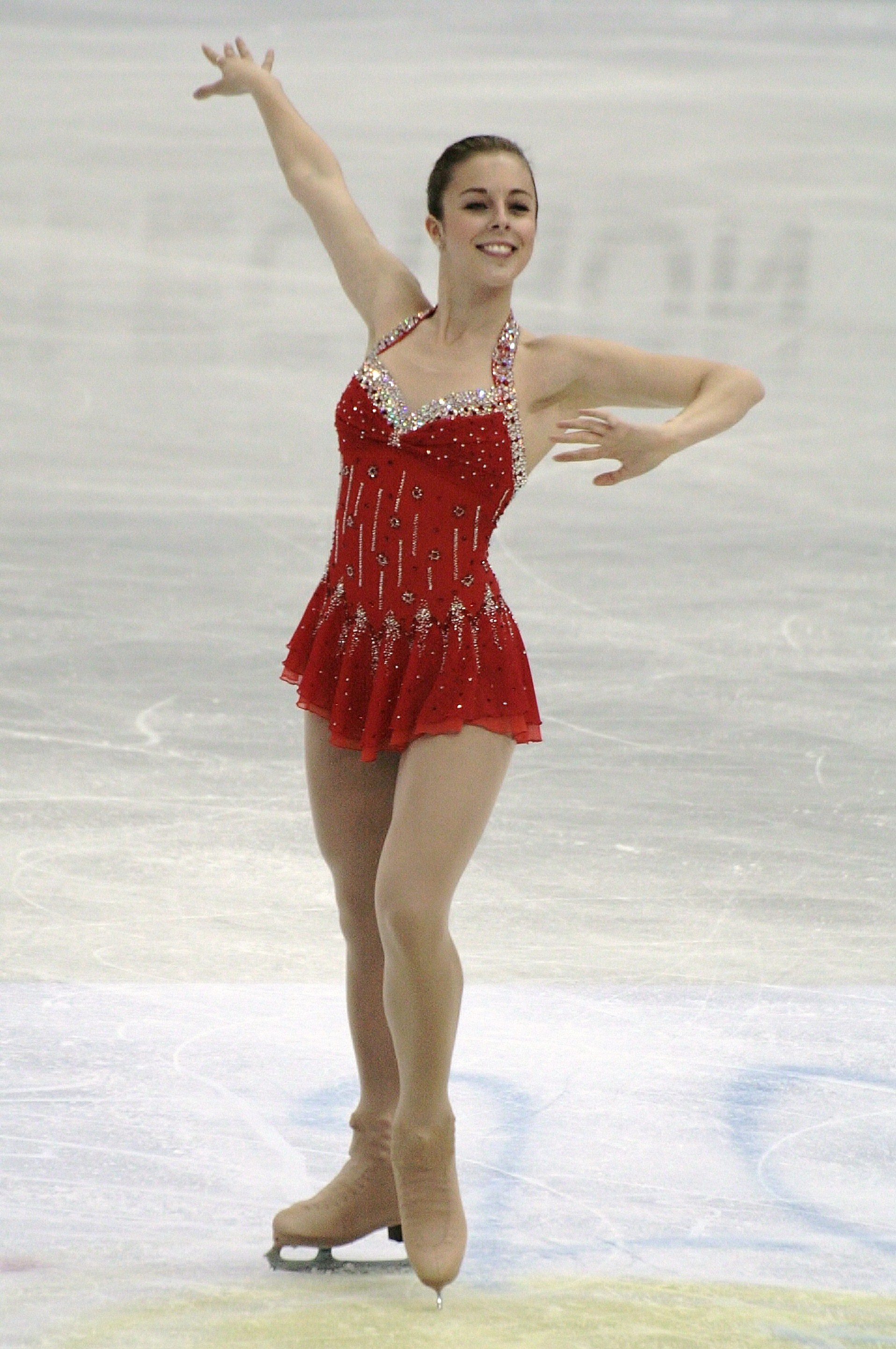 Эшли Вагнер (США) на чемпионате мира по фигурному катанию 2012